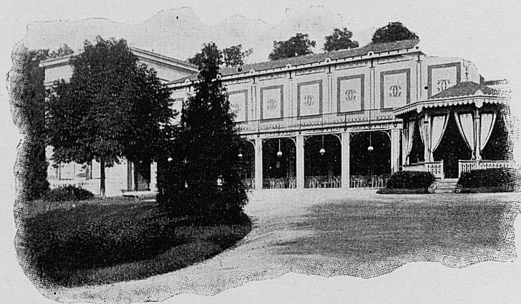 Dictionnaire illustré des communes du département du Rhône. Tome 1 / par MM. E. de Rolland et D. Clouzet.